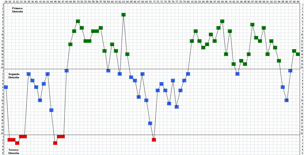 Trayectoria Real Valladolid